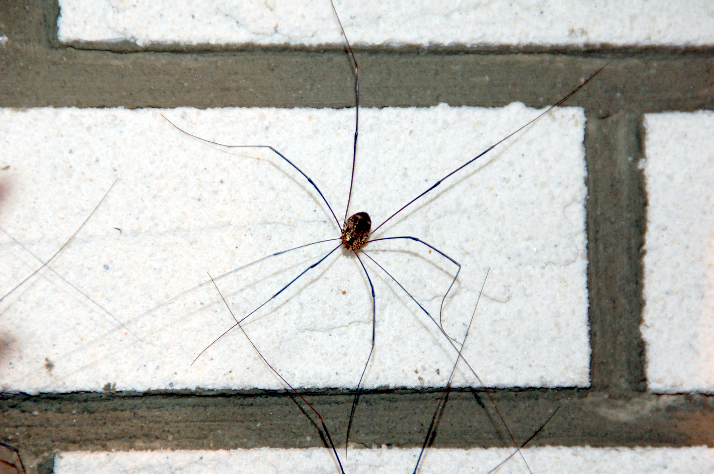 Leiobunum species, Gefangenschaft, Spinnen-Ausstellung, Naturhistorisches Museum Mainz, Deutschland